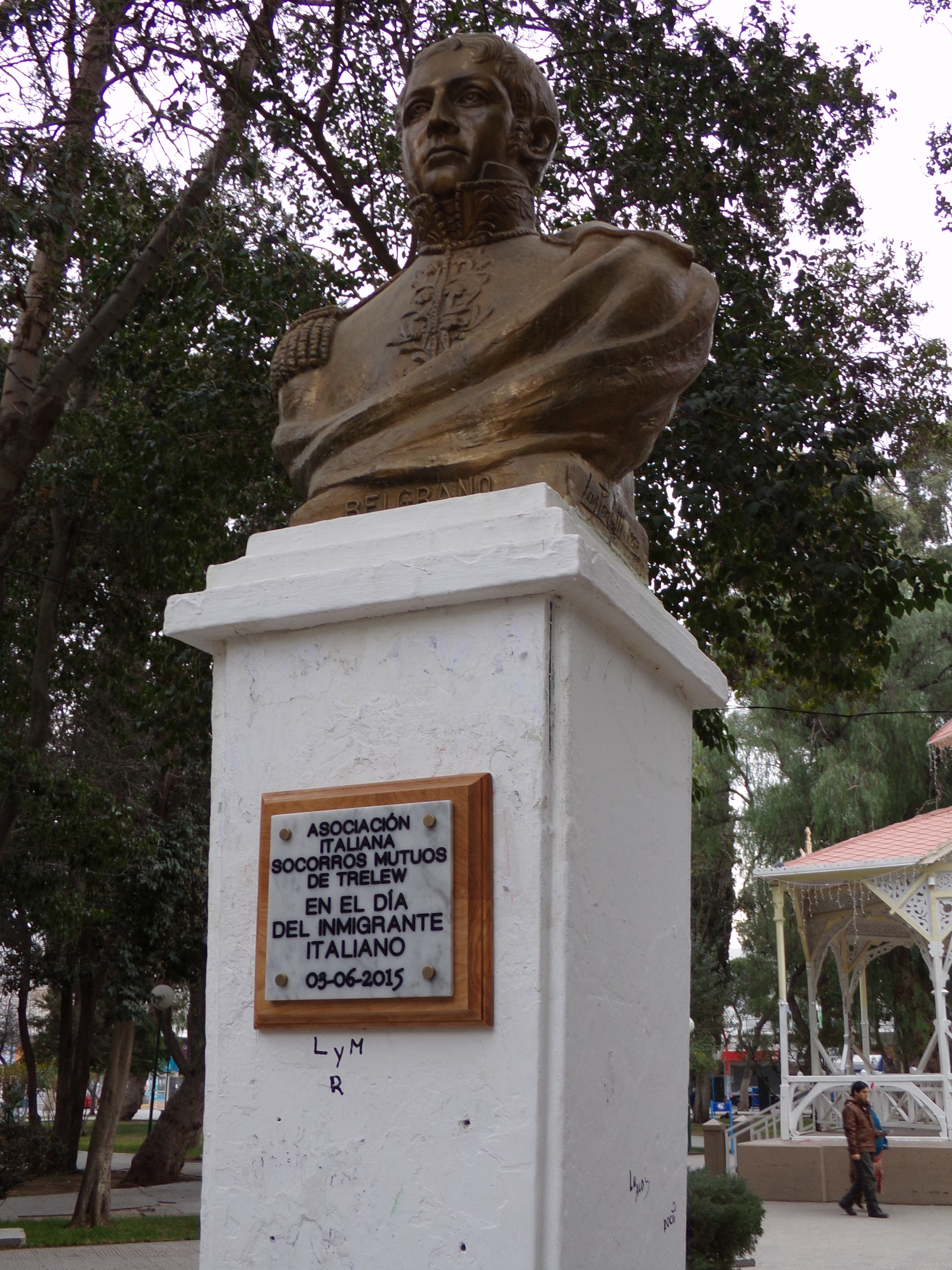 Monumento al Gral. Dr. Manuel Belgrano en Trelew, Chubut, recordando el Día del Inmigrante Italiano en Argentina.